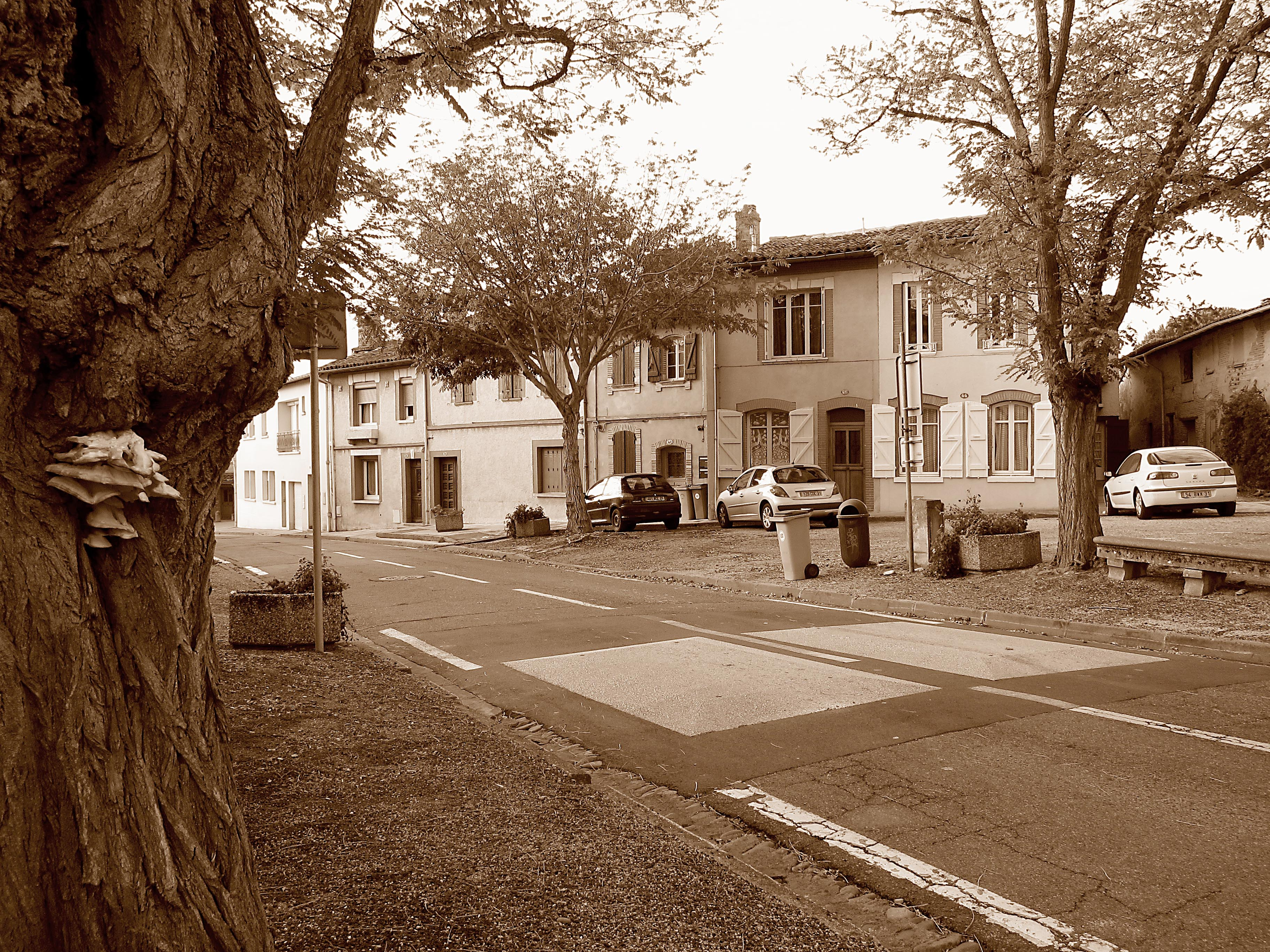 Toulouse (Haute-Garonne, Midi-Pyrénées, France) : La Rue Fondeville à Pouvourville.